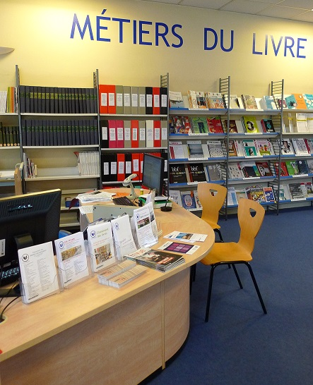 Photo du CDML, espace dédié à la documentation sur les Métiers du Livre au sein de la bibliothèque Buffon